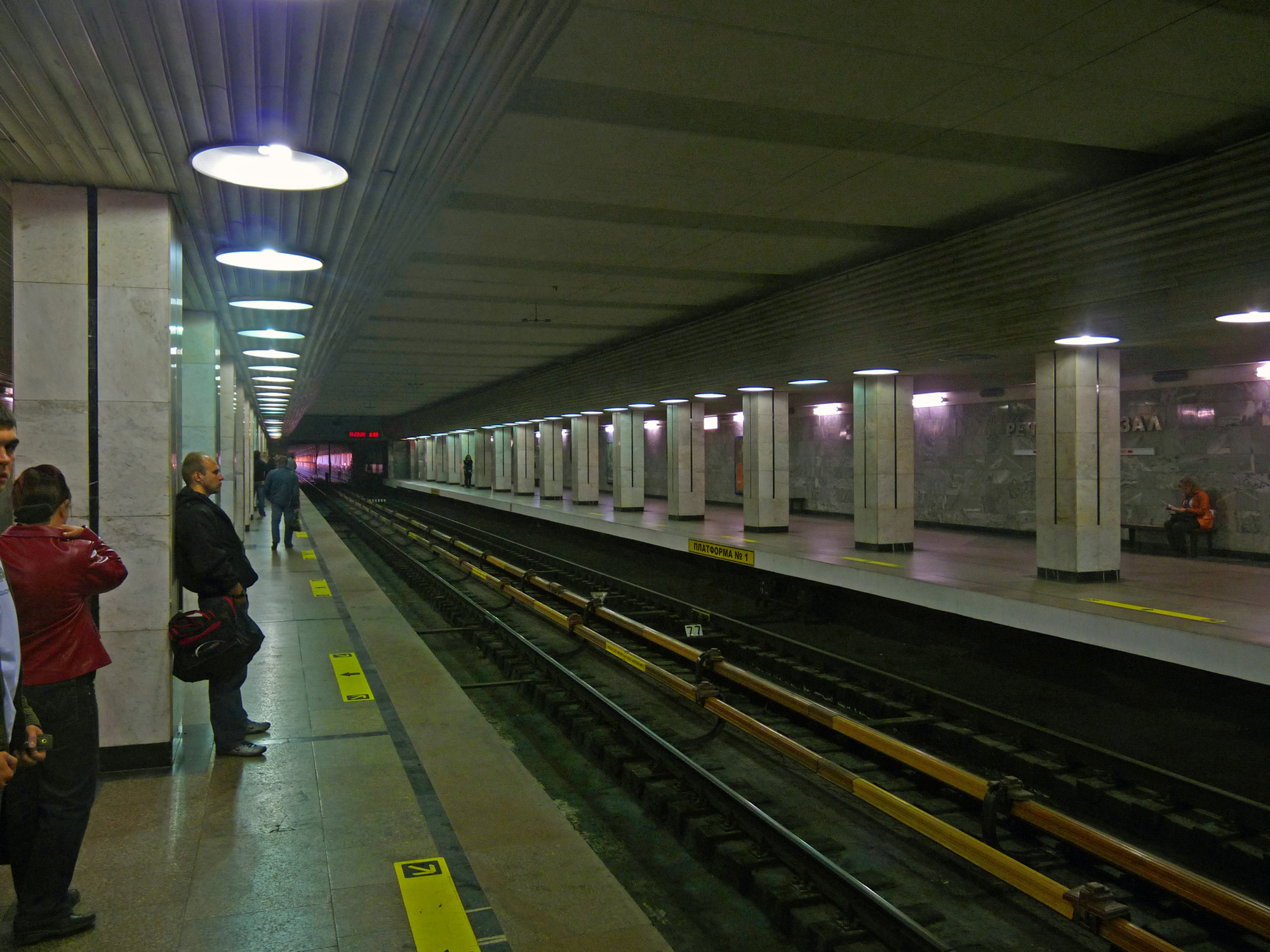 Станция Речной вокзал Новосибирского метрополитена